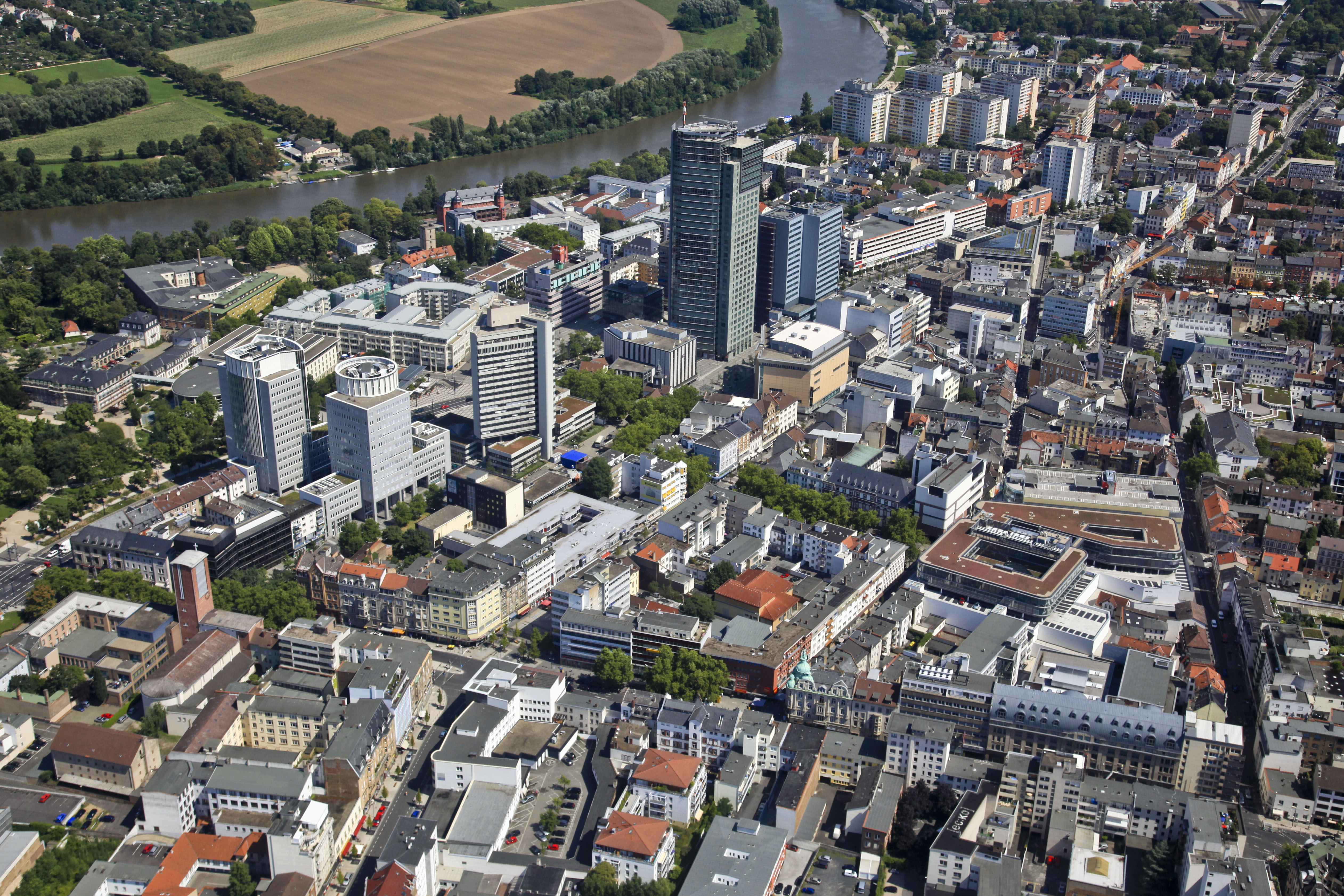 Luftansicht der Offenbacher Innenstadt